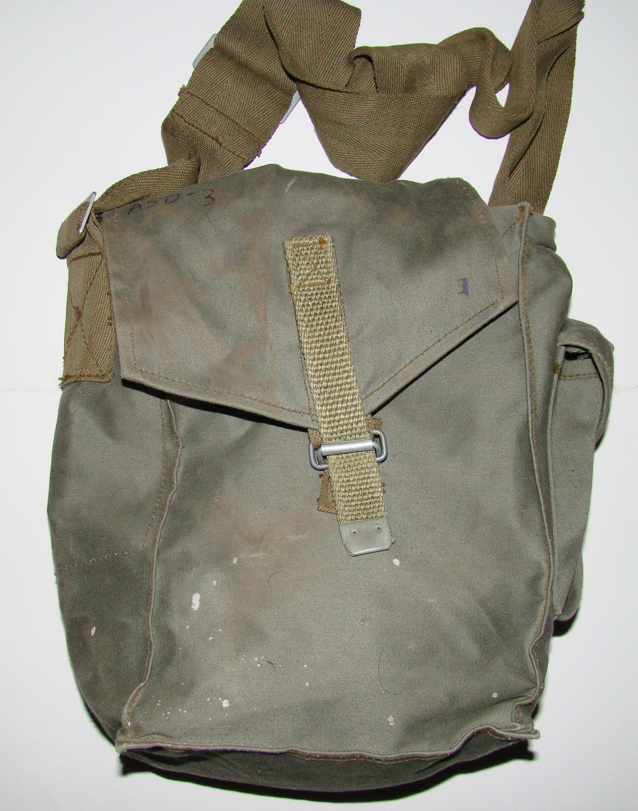 Torba na maskę pgaz LWP - nieznam typu (pierwszy typ do MP-4?).